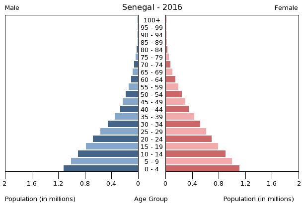 A population pyramid illustrates the age and sex structure of a country's population and may provide insights about political and social stability, as well as economic development. The population is distributed along the horizontal axis, with males shown on the left and females on the right. The male and female populations are broken down into 5-year age groups represented as horizontal bars along the vertical axis, with the youngest age groups at the bottom and the oldest at the top. The shape of the population pyramid gradually evolves over time based on fertility, mortality, and international migration trends.